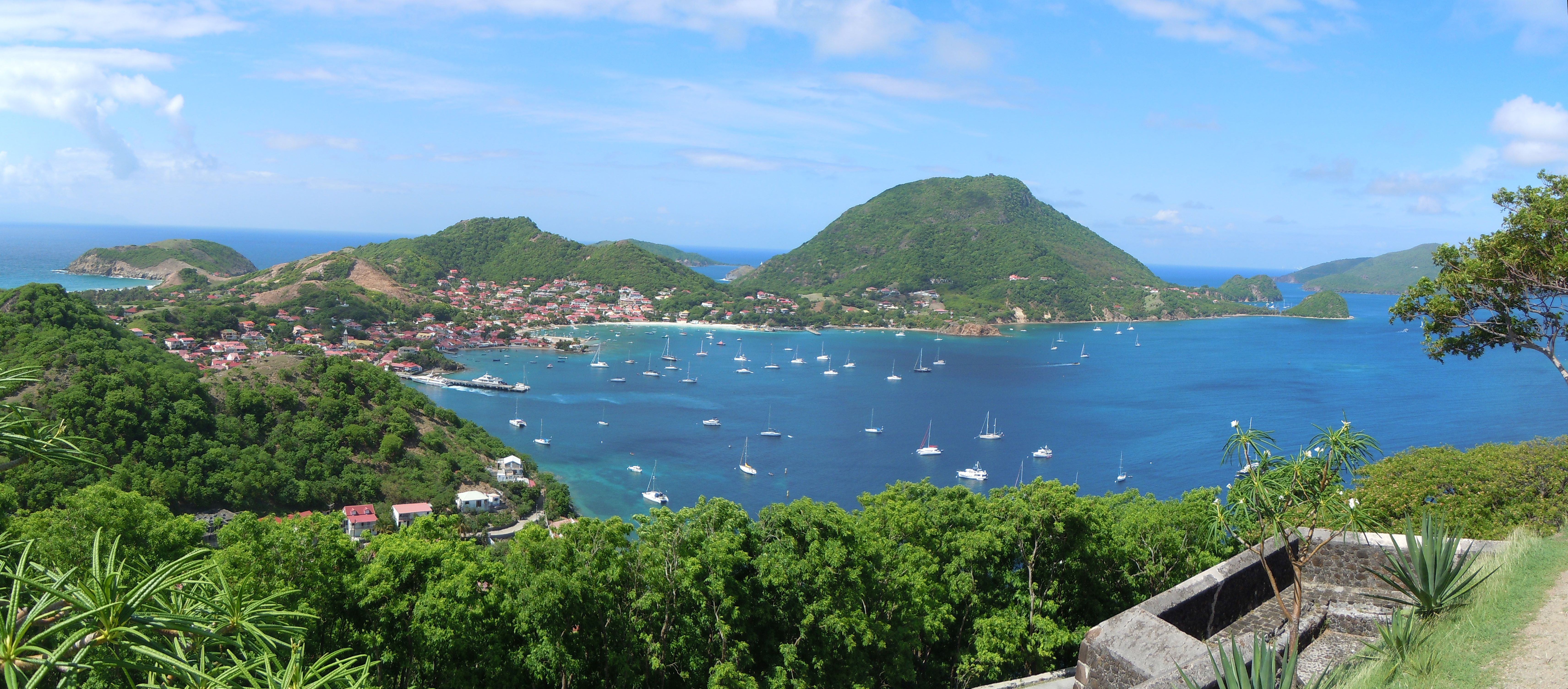 Baie des Saintes depuis le Fort Napoléon des Saintes